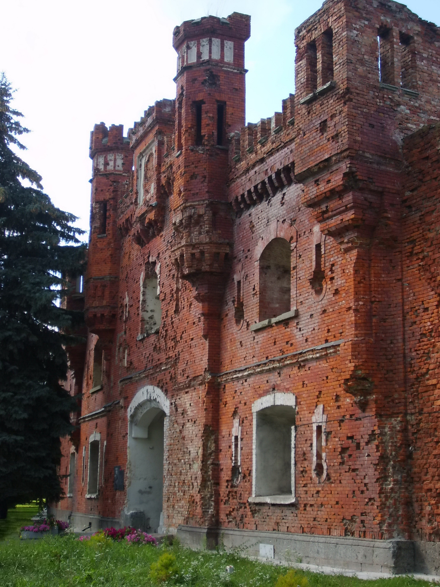 Казарма-проход в Брестской крепости